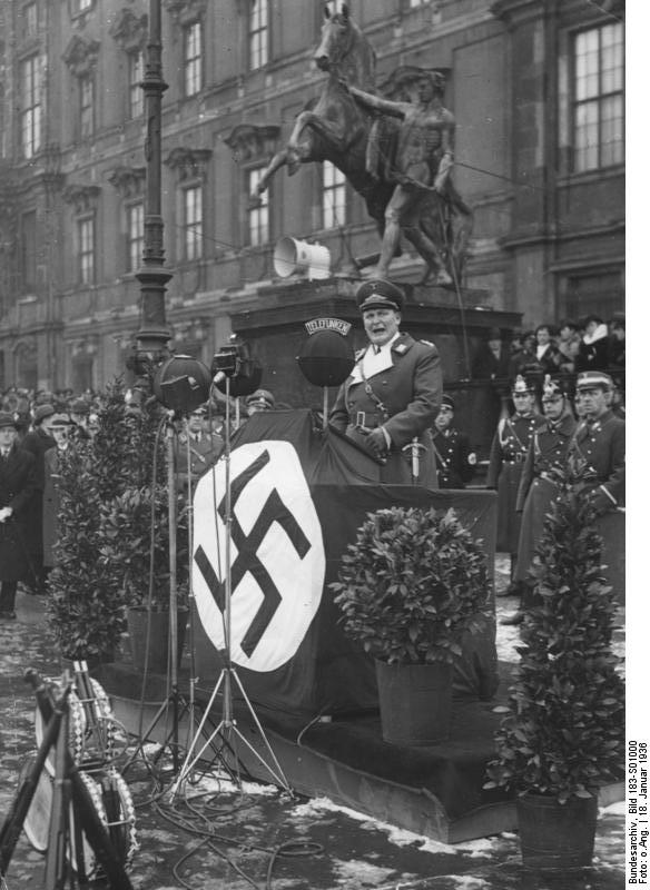 Factual corrections and alternative descriptions are encouraged separately from the original description. Additionally errors can be reported at this page to inform the Bundesarchiv. Original historic description: Berlin, Vereidigung des Feldjägerkorps Vereidigung des Feldjägerkorps im Berliner Lustgarten am 18.1.1936 Ministerpräsident Göring spricht Abgebildete Personen: Göring, Hermann: Reichsmarschall, Oberbefehlshaber der Luftwaffe, Ministerpräsident von Preußen, Deutschland